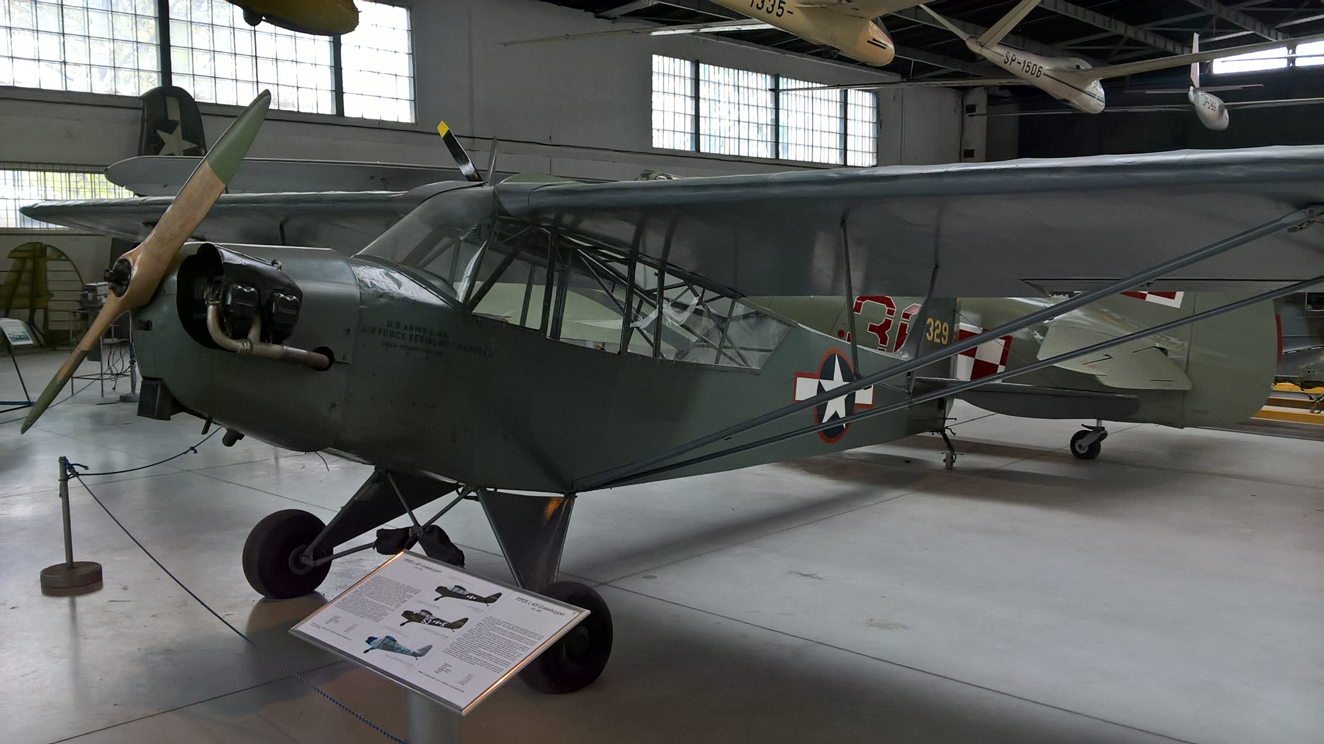 Amerykański samolot łącznikowo-obserwacyjny Piper L-4A Grasshopper z 1943 r., eksponowany w Muzeum Lotnictwa Polskiego w Krakowie.